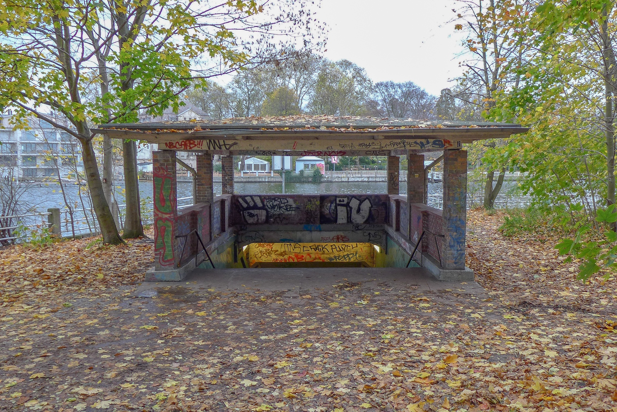 Datei:Berlin - Spreetunnel Friedrichshagen - Südeingang (2013)